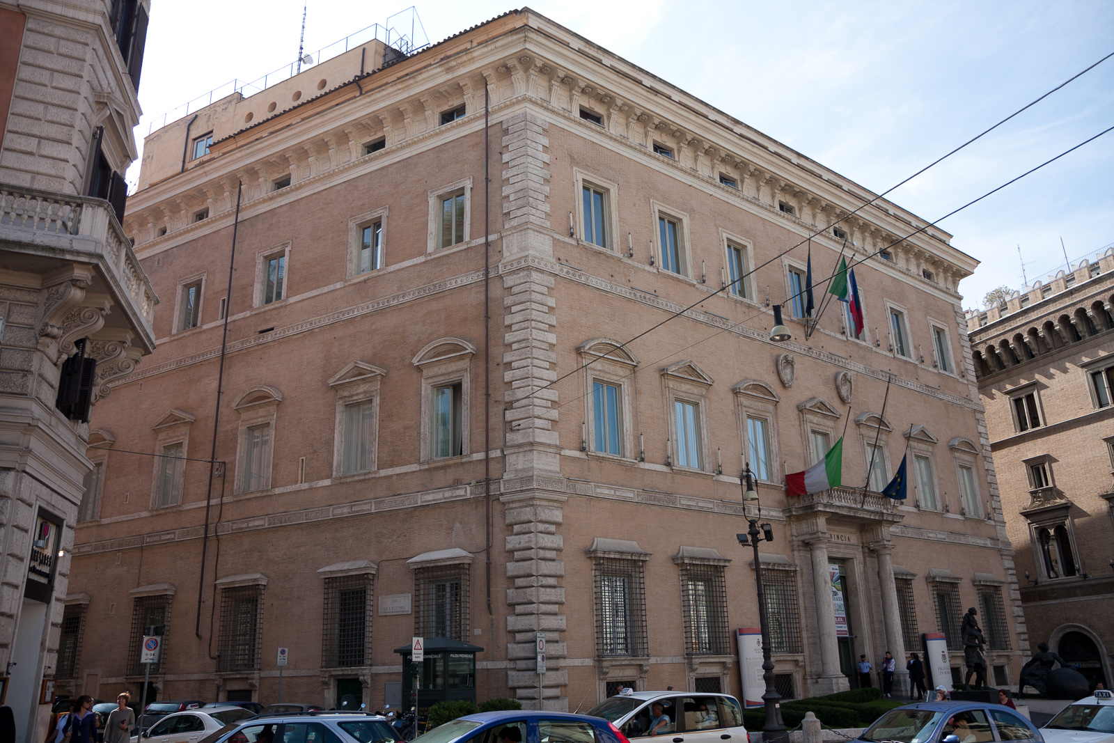 Palazzo della Provincia